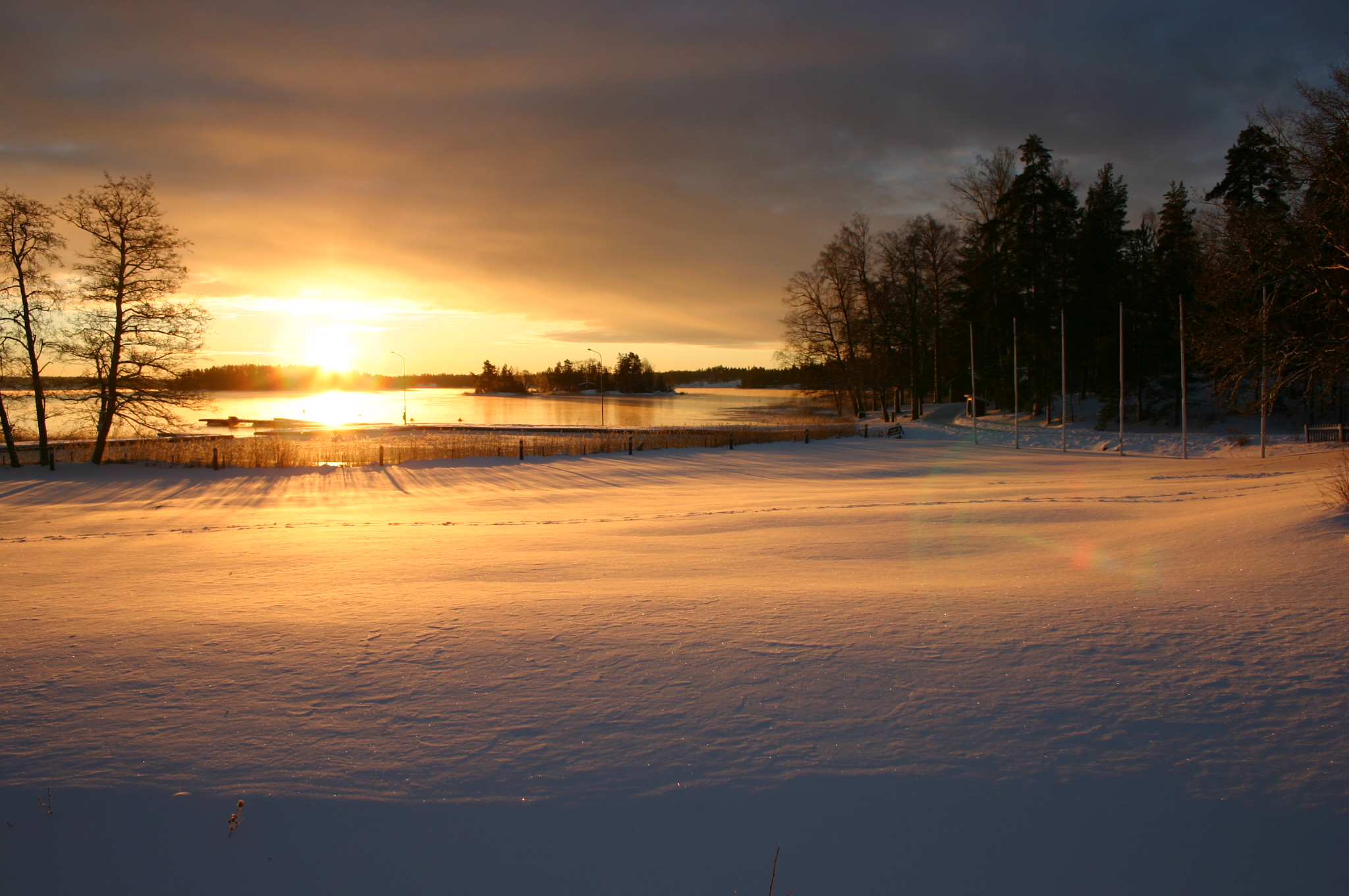 Calliolan ranta-alue talvella